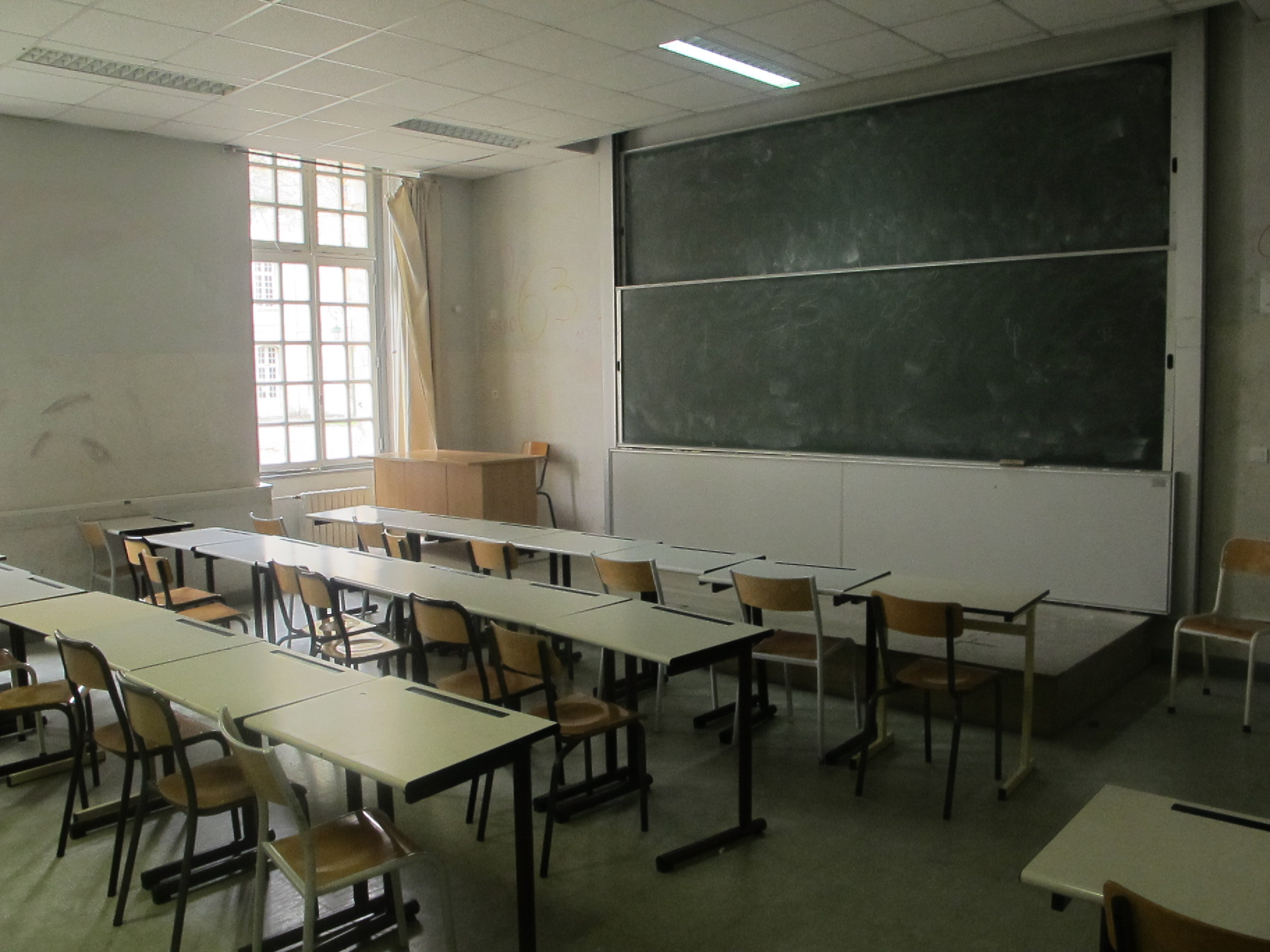 Une salle de classe du lycée militaire de Saint-Cyr.